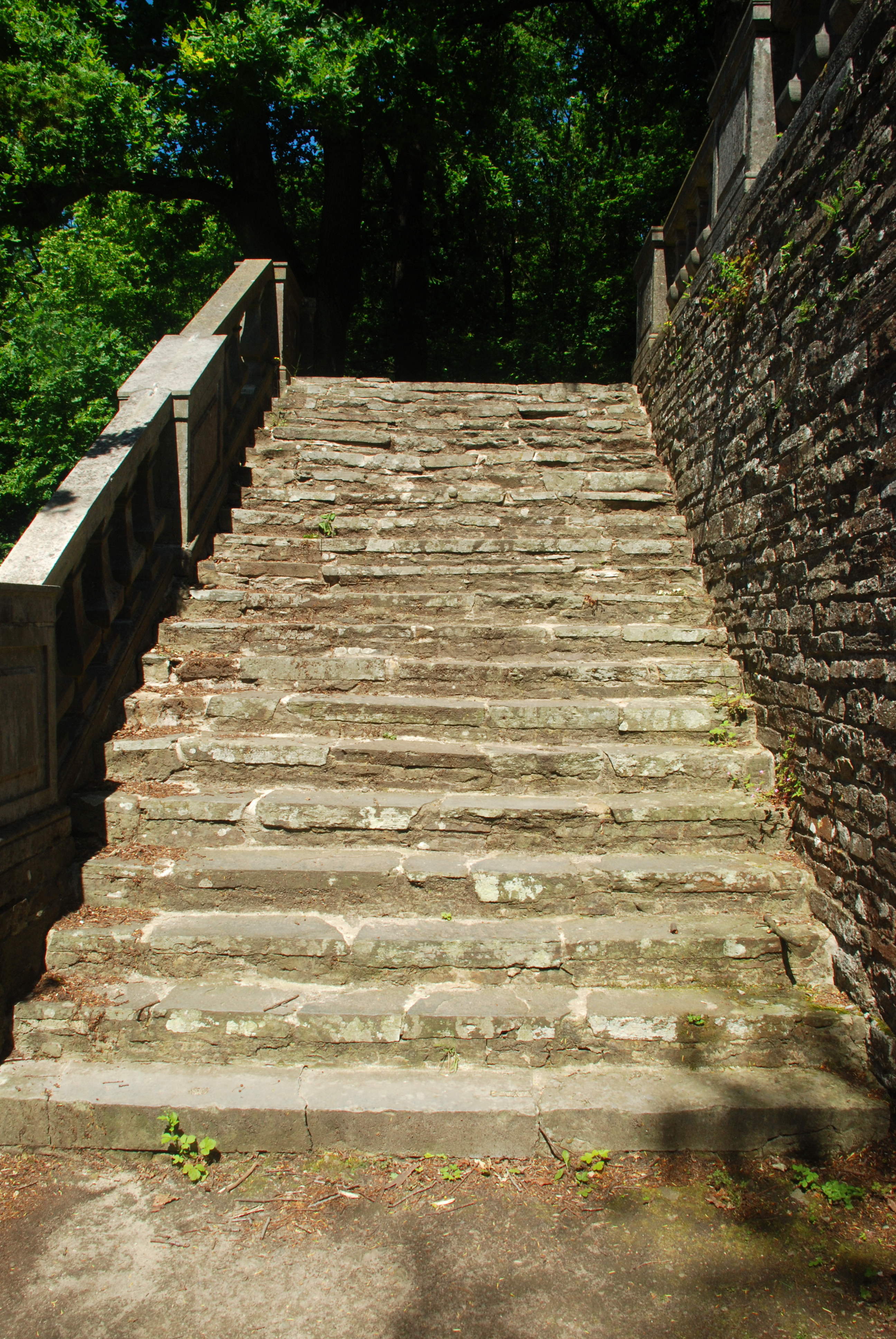 Belgique - Brabant wallon - Villers-la-Ville - Escalier menant à la chapelle Notre-Dame de Montaigu